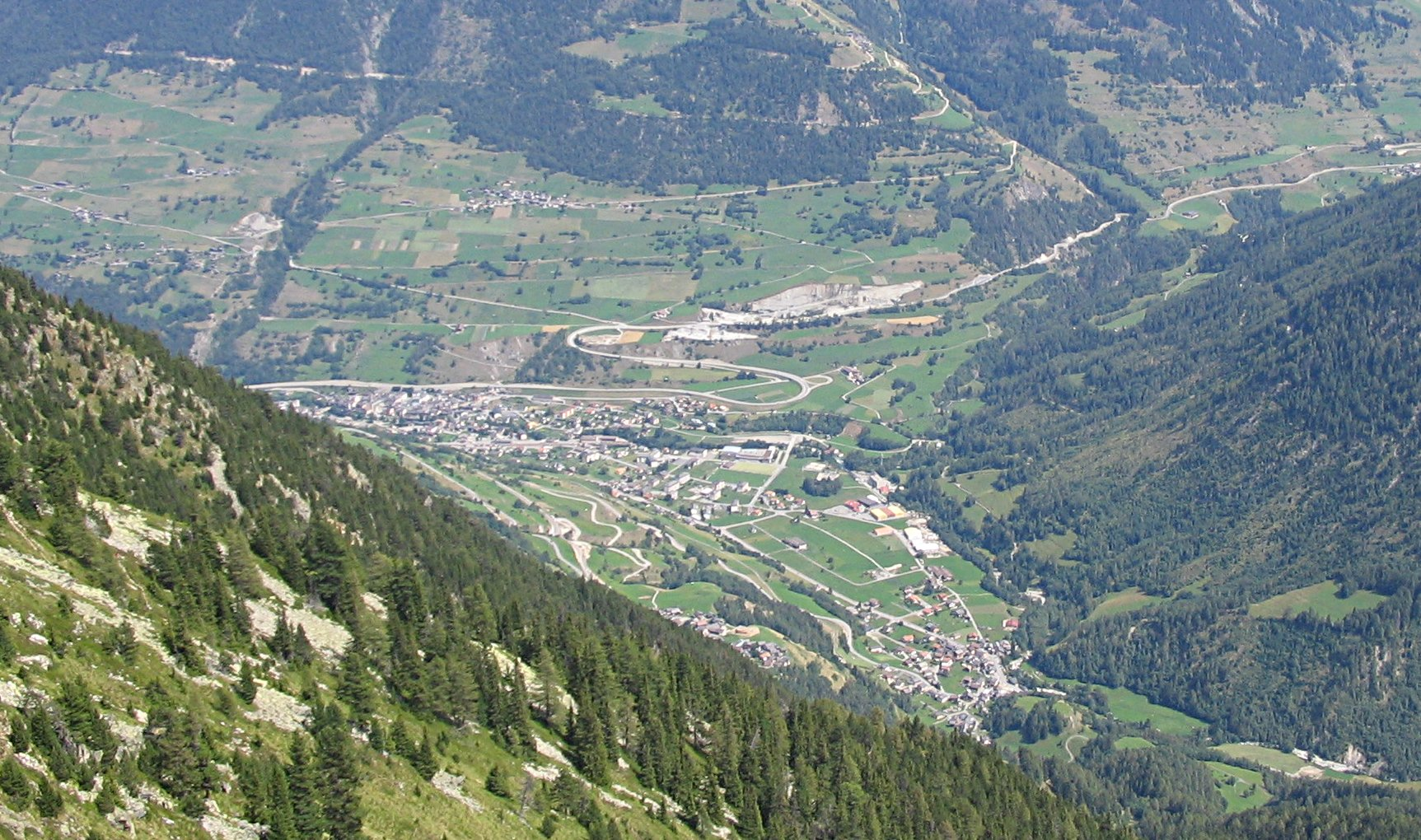 Vue de la ville d'Orsières, depuis la proximité du télésiège de la Breya